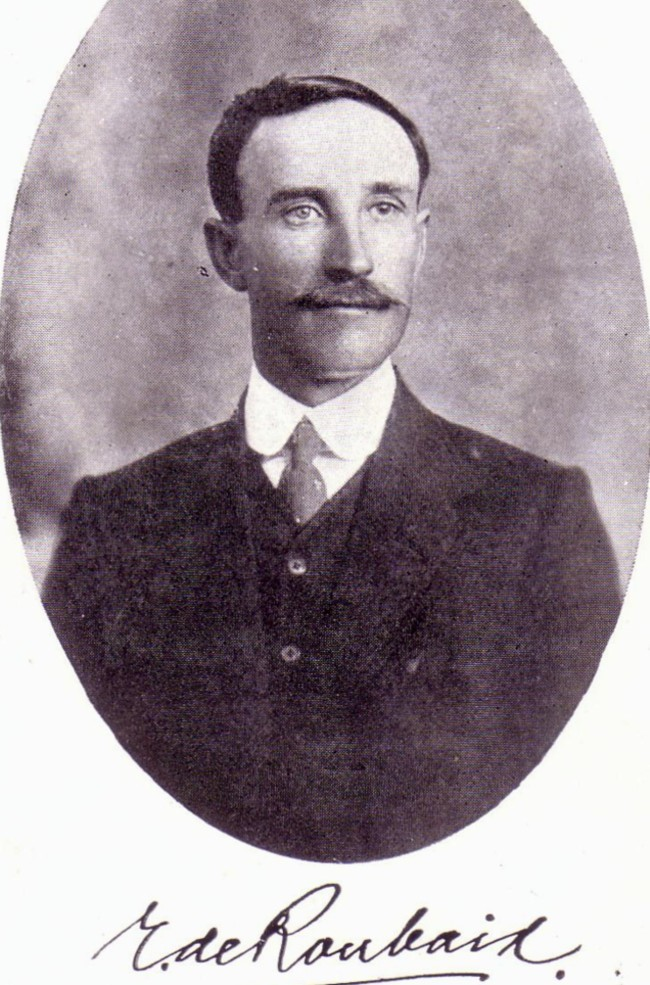 E. de Roubaix